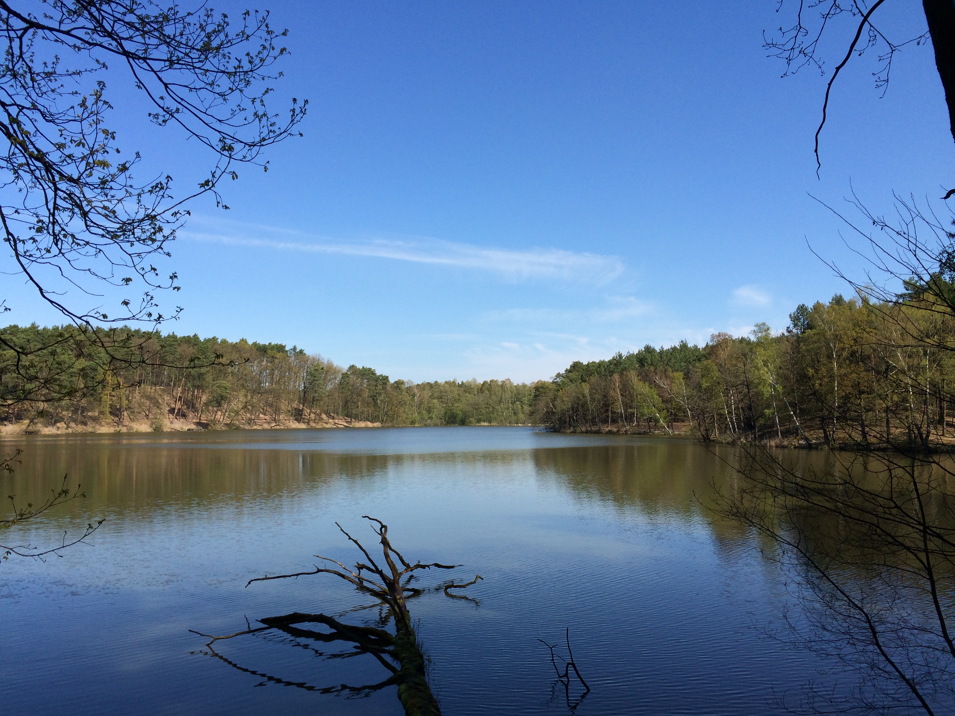 Die Heideseen bilden eine Seenplatte südlich des Ortsteils Köthen in Märkisch Buchholz, Brandenburg